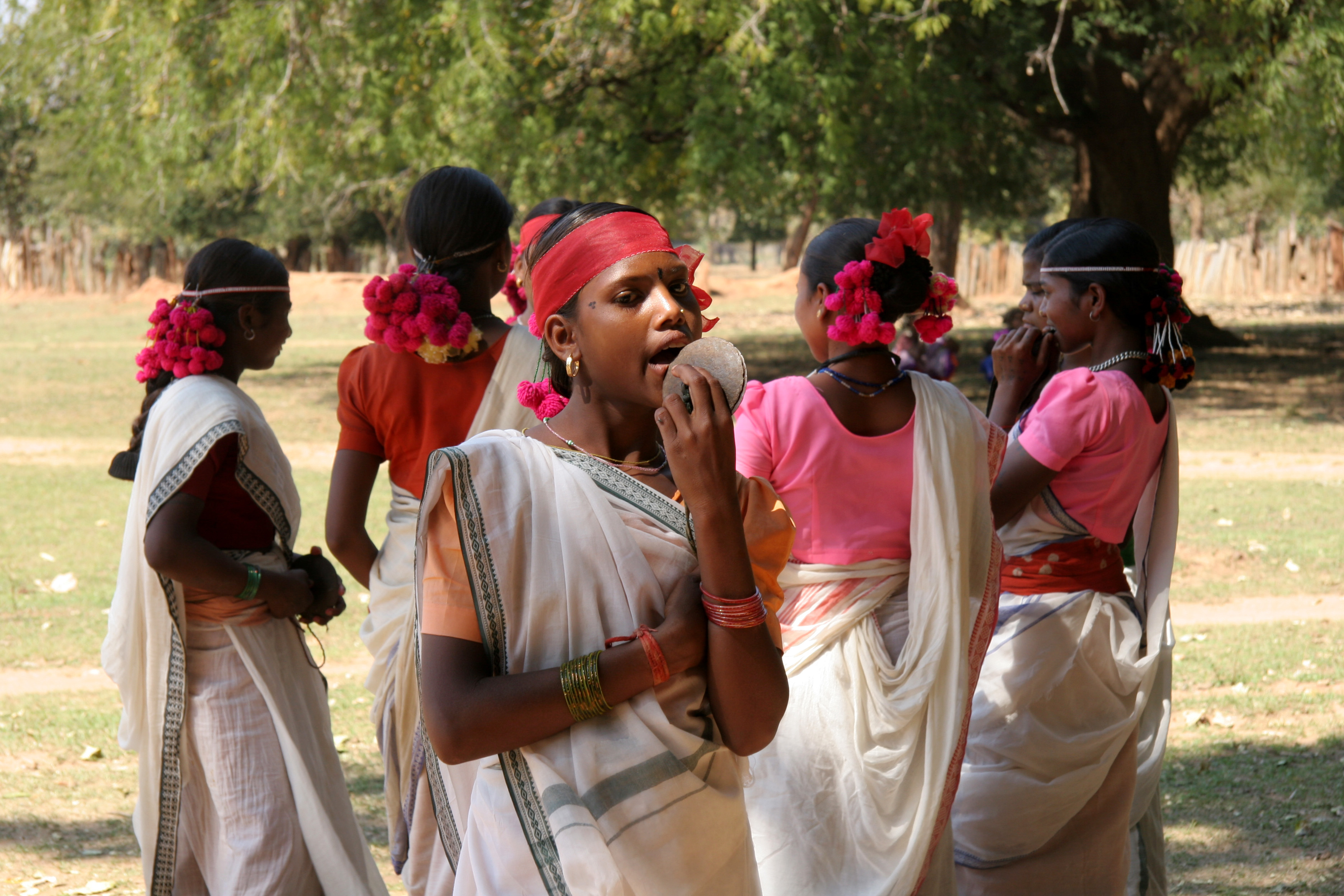 inde bastar femmes muria costumées pour la danse